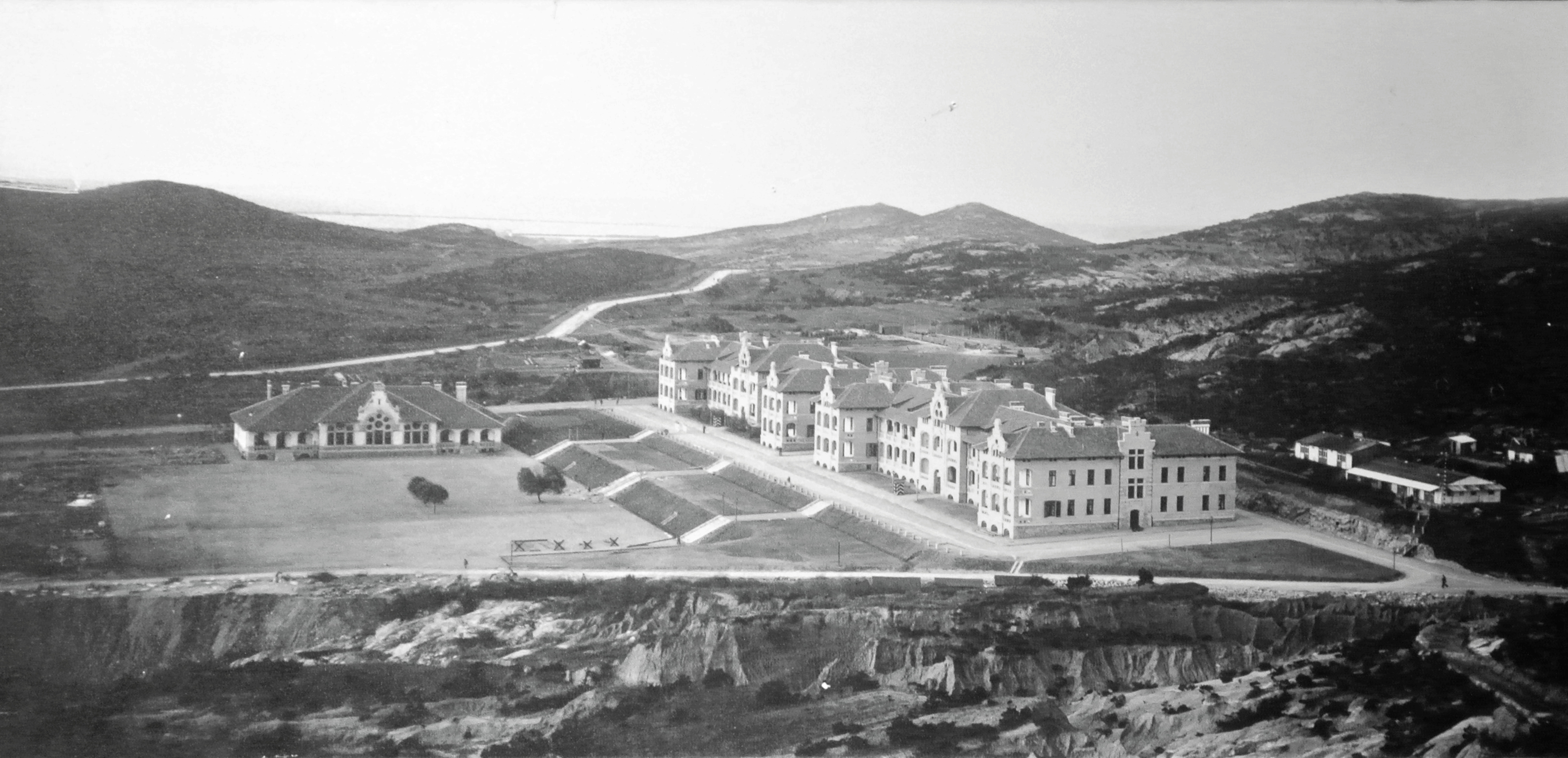 青岛俾斯麦兵营I、II号营房